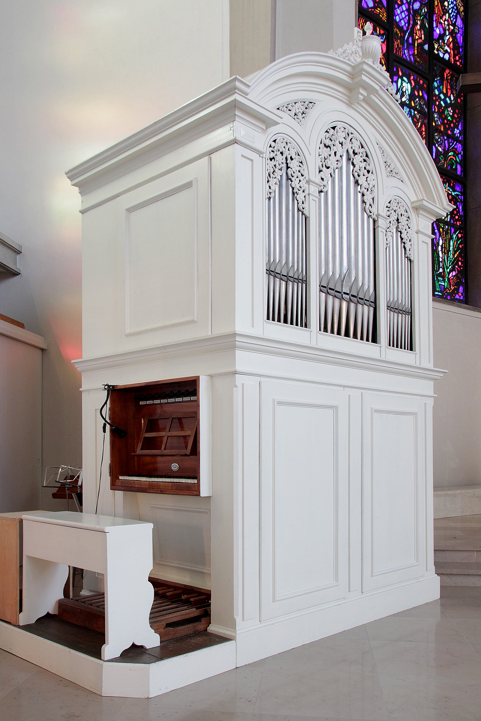 römisch-katholische Kirche Maria Frieden, Dübendorf